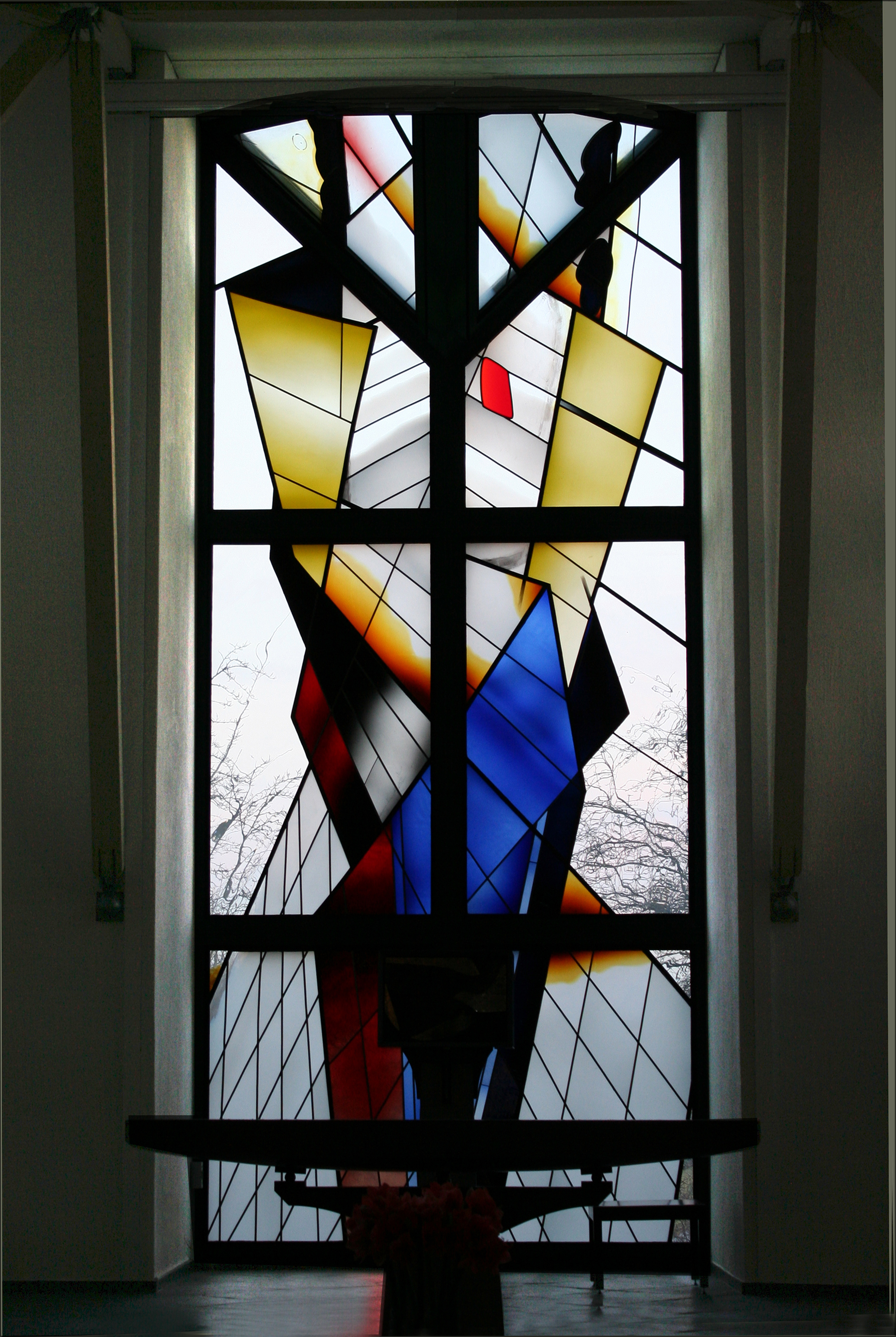 Römisch-katholische Pfarrkirche St. Katharina von Siena Fällanden, grosses Glasfenster von Granco G. Giacomel